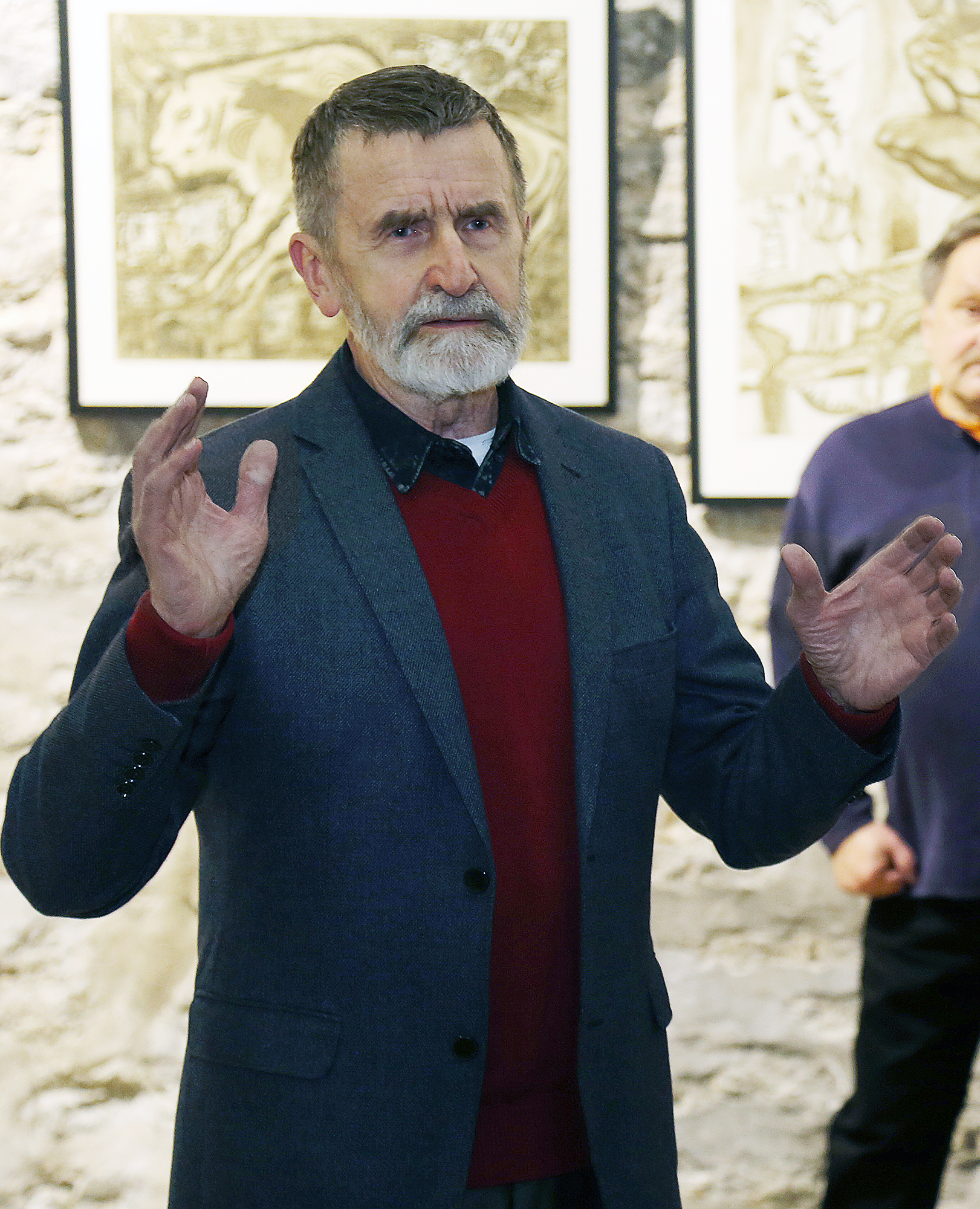 Heinz Valk, kunstnik ja poliitik Kiek in de Kökis 2017